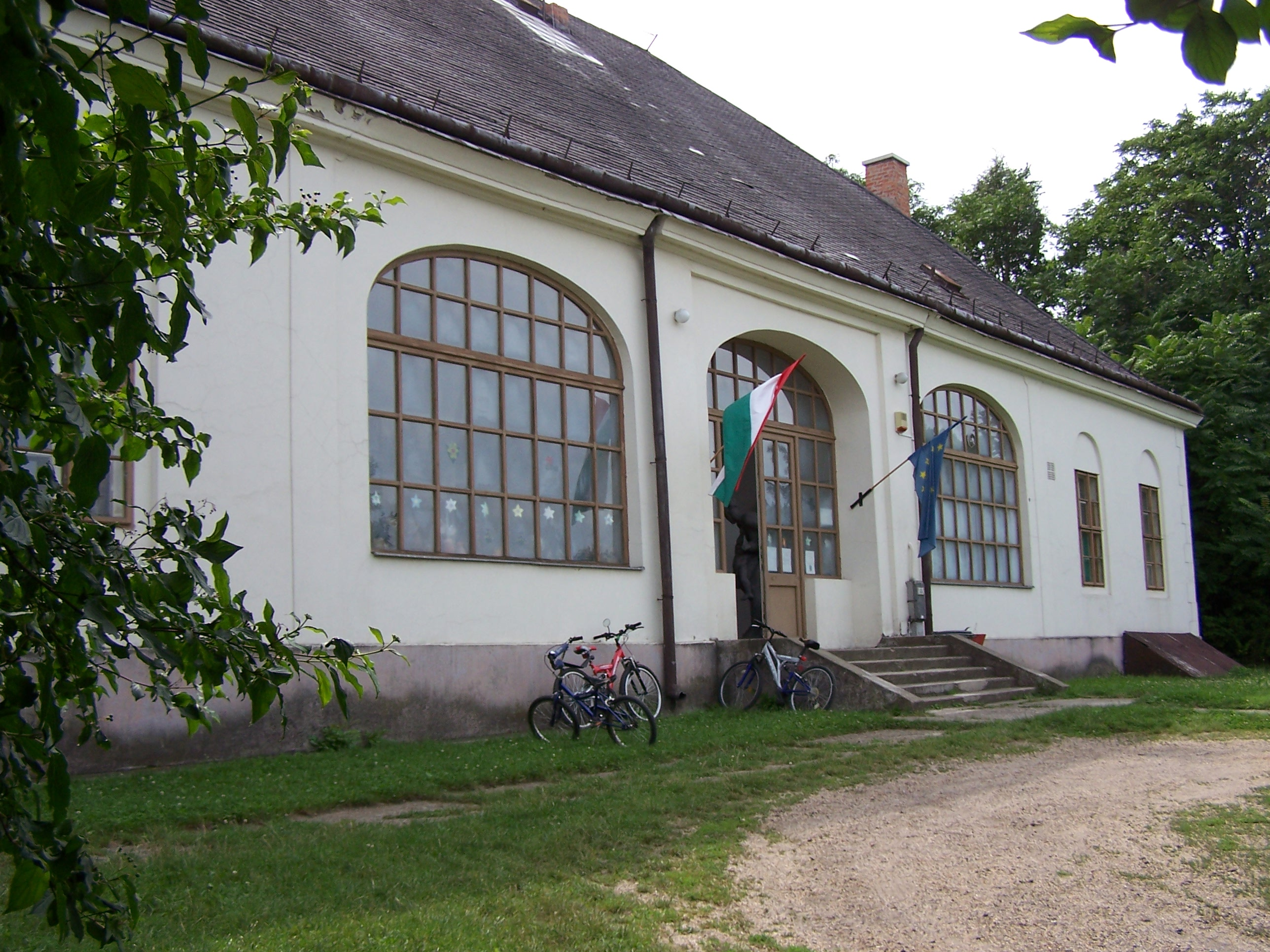 Dessewffy-kúria (Nagykökényes, Szabadság u. 12.) This is a photo of a monument in Hungary, Identifier: 5799